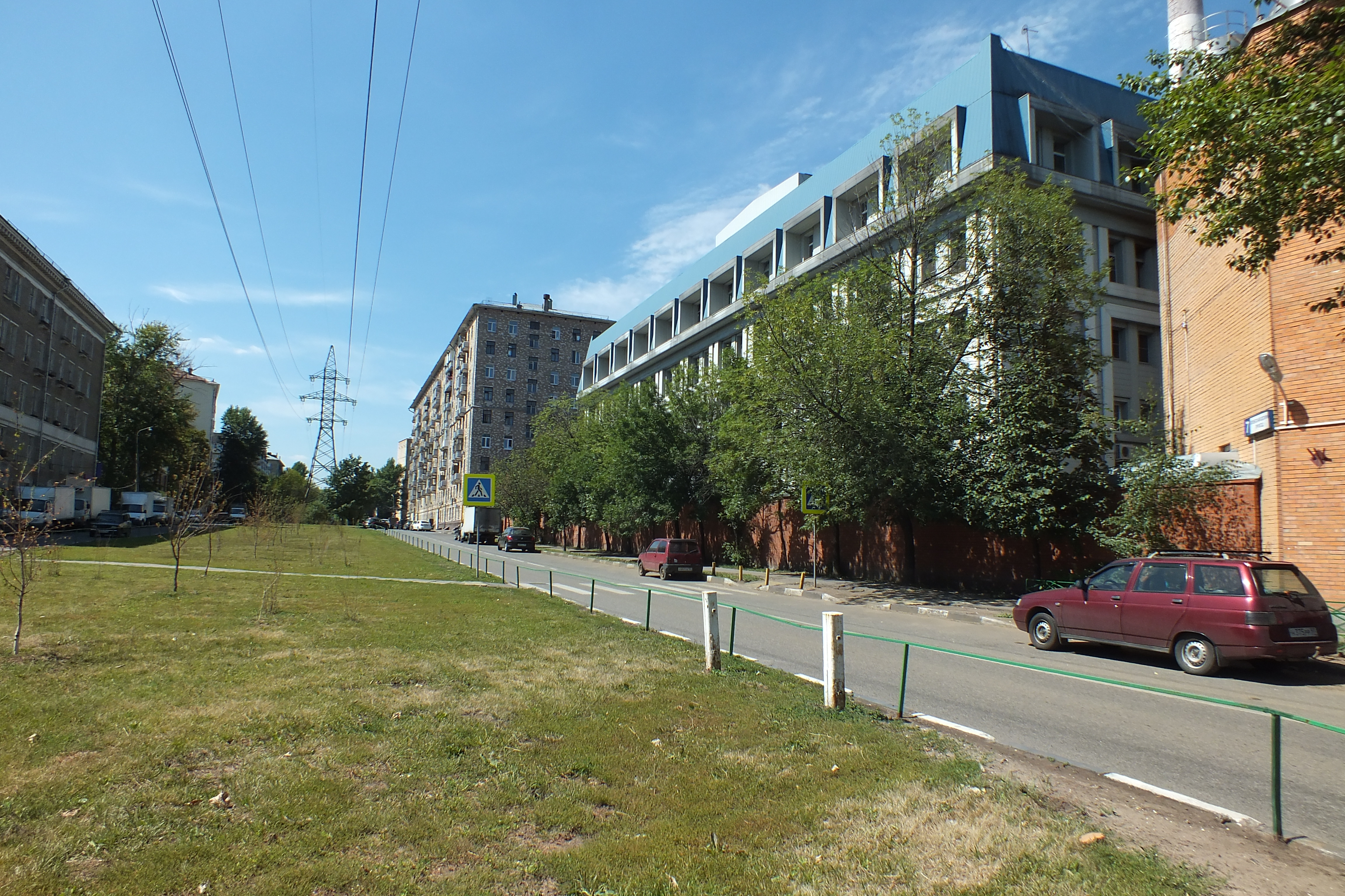 Восточная часть Хлебозаводского проезда в Москве, состоящего из двух параллельных дорог.